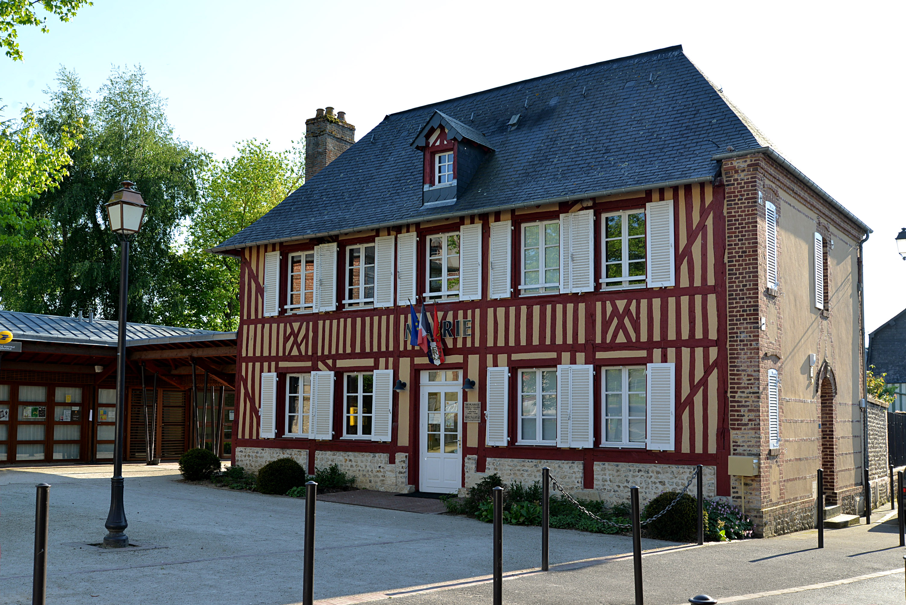 Le Breuil-en-Auge (Calvados)